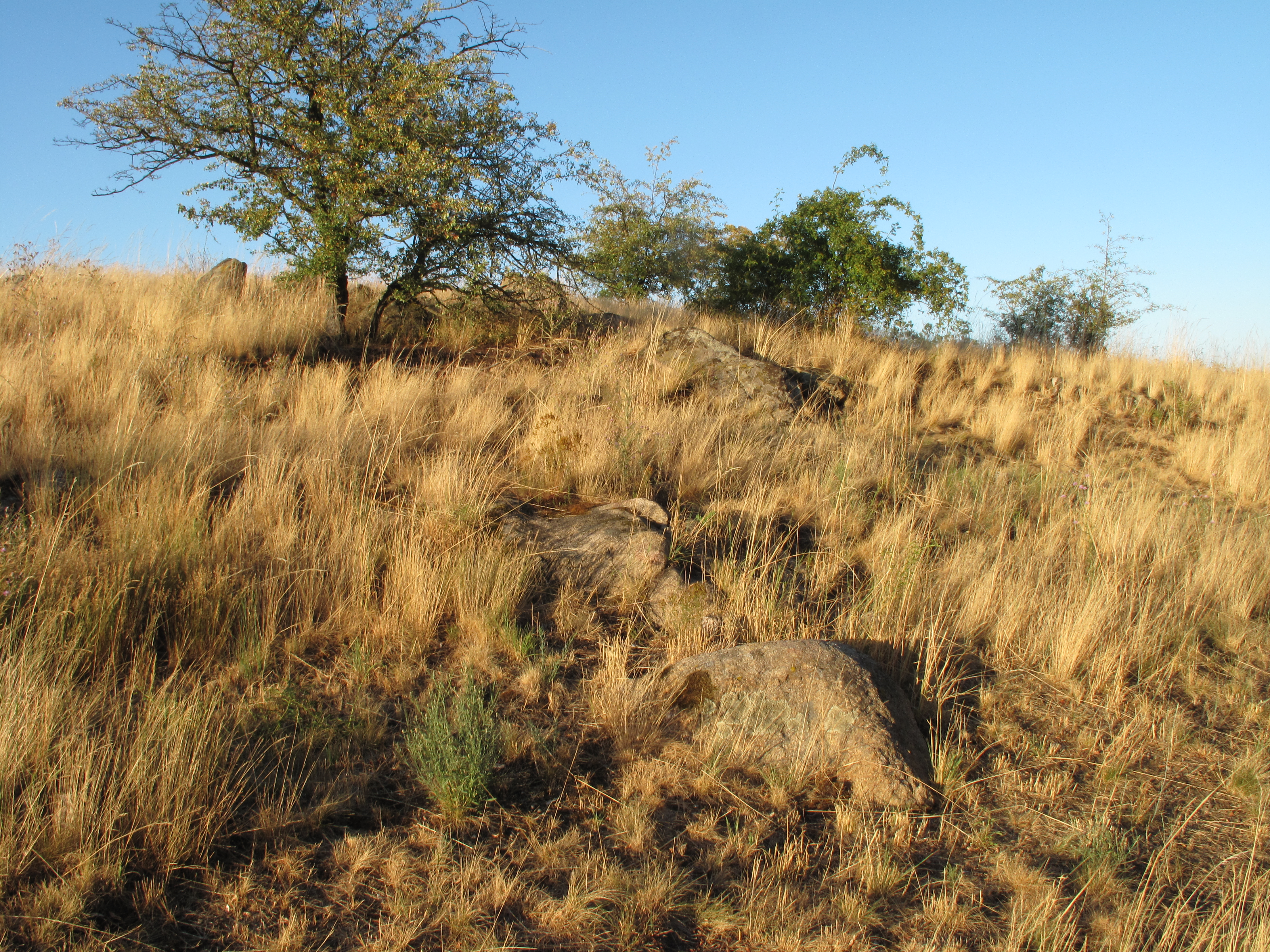 Přírodní památka Šidlovy skalky. Okres Znojmo, Česká republika.